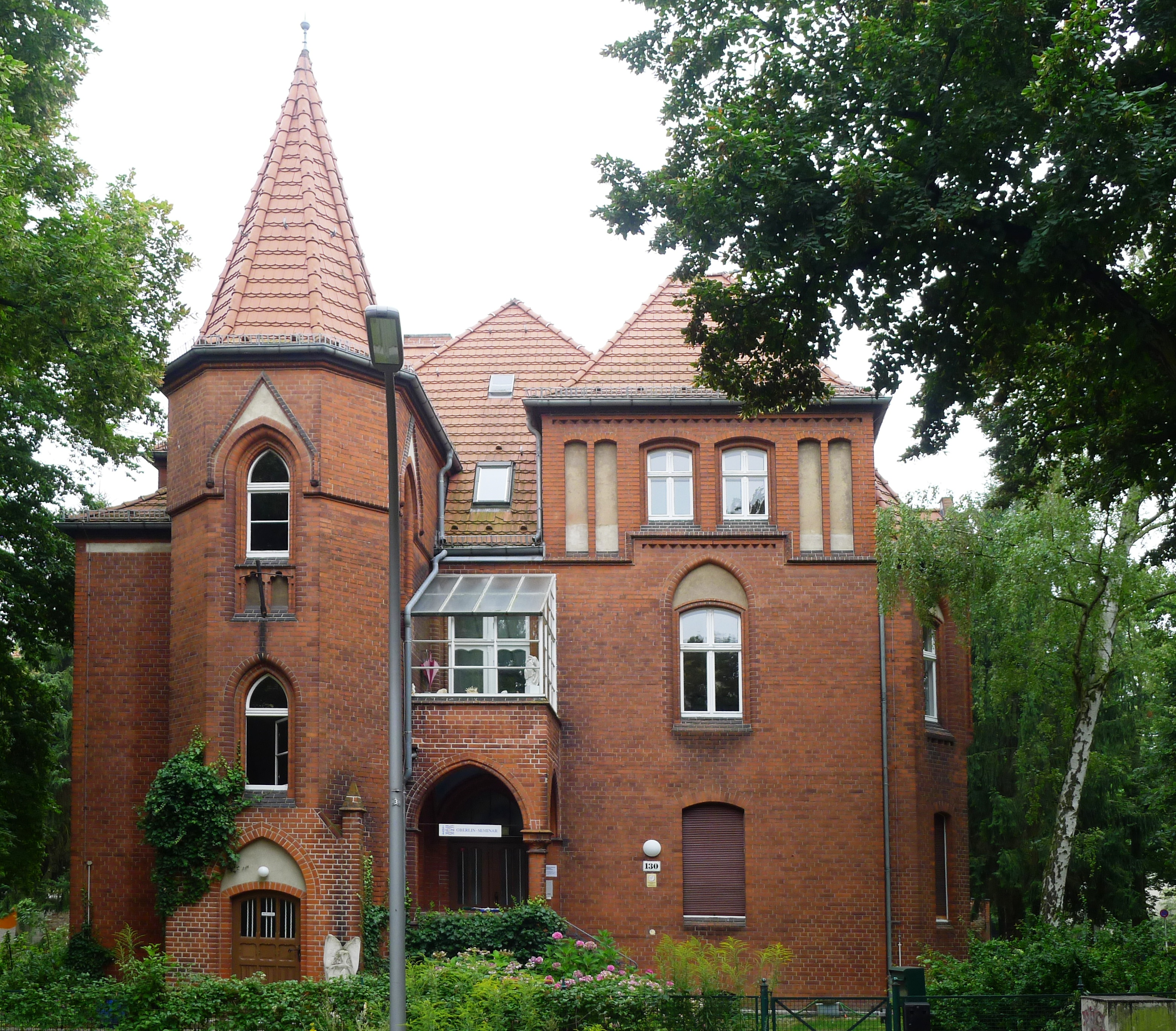 Ehemaliges Pfarrhaus